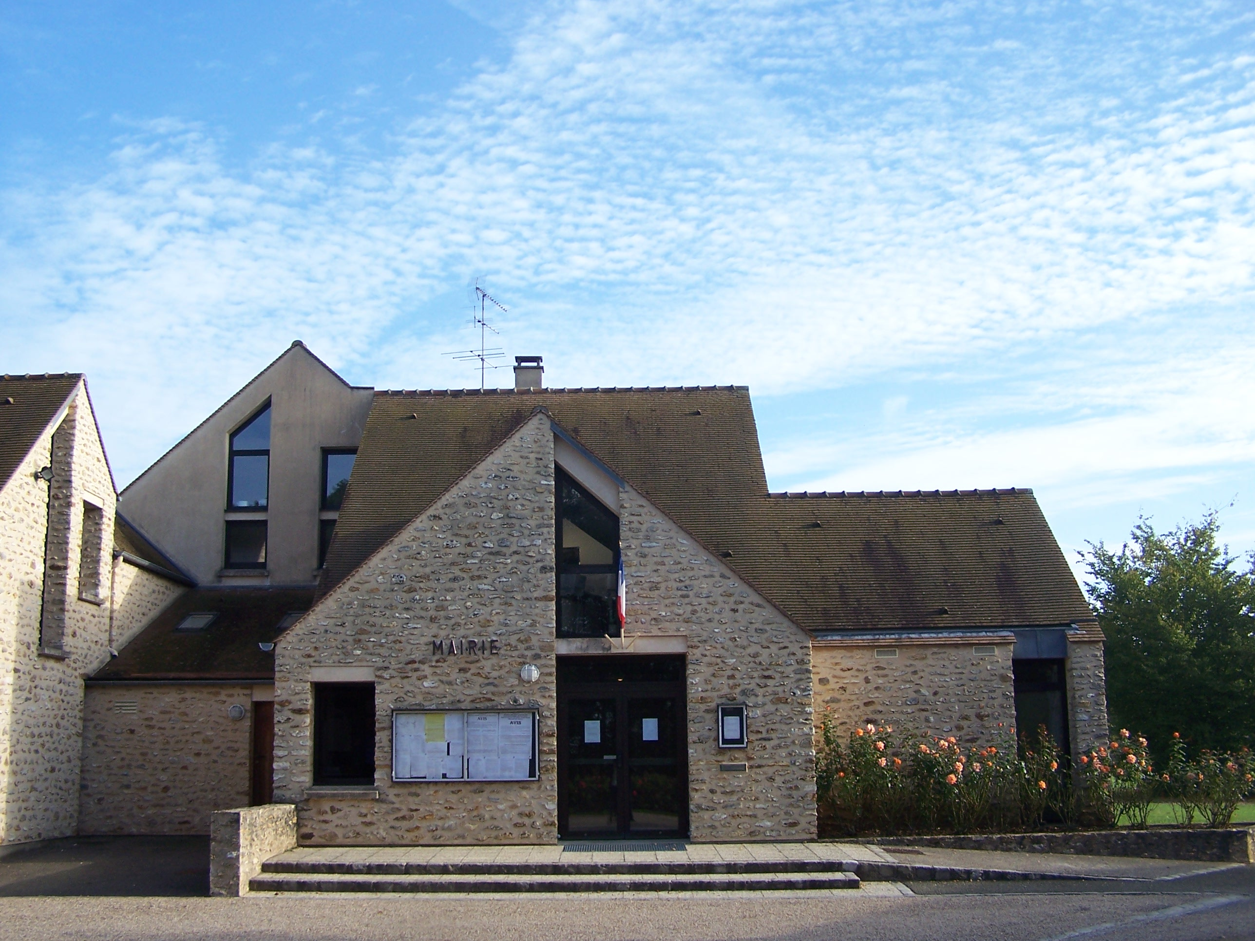 Mairie de La-Celle-les-Bordes (Yvelines, France)